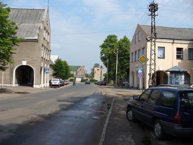 Stadtansicht in Stallupönen